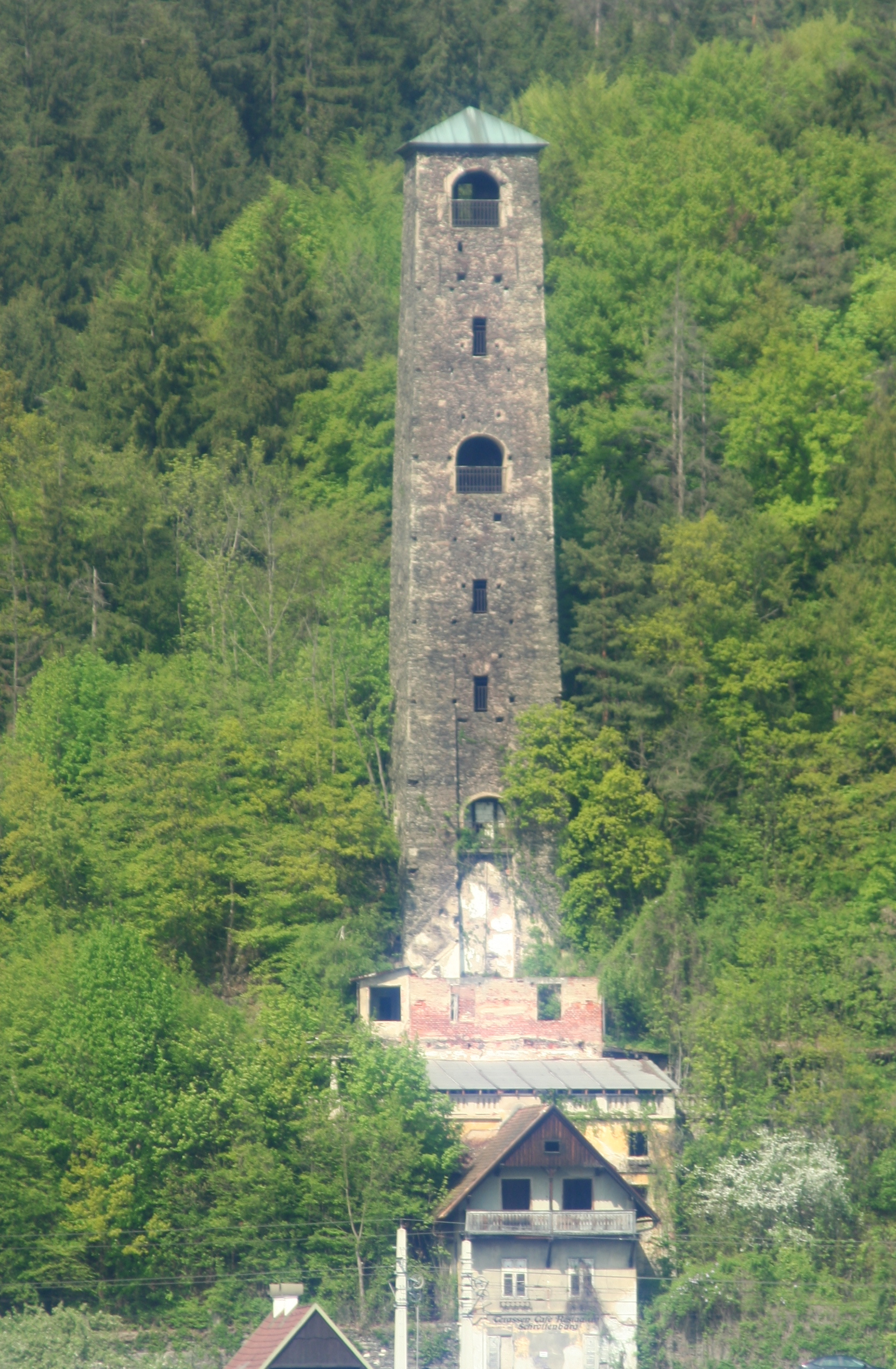 Schrottenturm in Klagenfurt-Gurlitsch I, 1824 errichtet von Johann Rainer, Schrotturm bis 1893, Aussichtsturm und Gaststätte 1927–1970